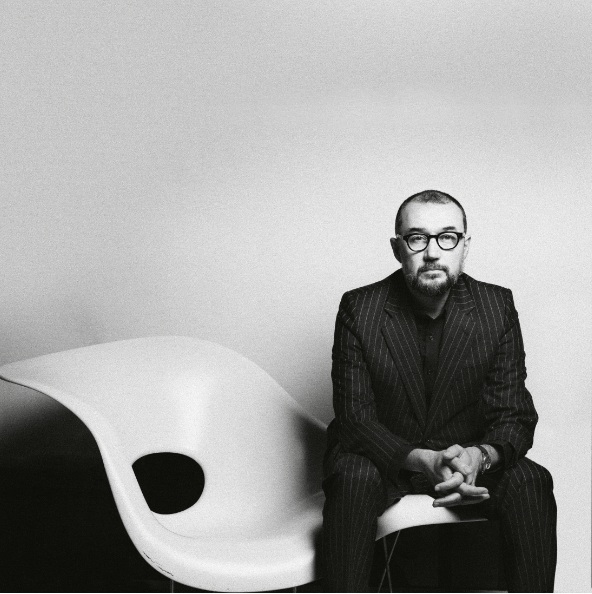 Andrés Rodríguez, presidente y editor de Spainmedia